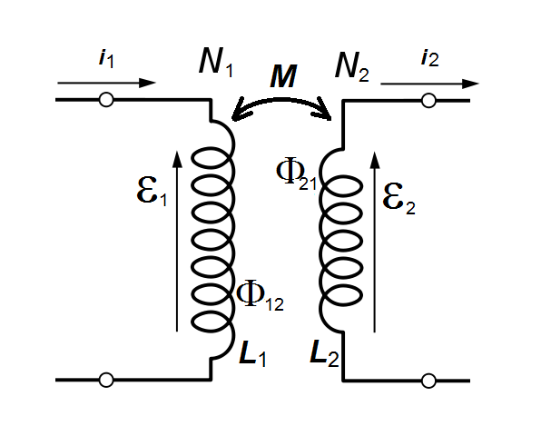 A hypothetical linear transformer, consisting of N1 turns in the primary winding, and N2 in the secondary. Electrical power supplied to the primary circuit is delivered to the load in secondary circuit by means of mutual induction. The time-varying magnetic flux in the core generates an electromagnetic force over each of the windings. Original work made by user "Me"